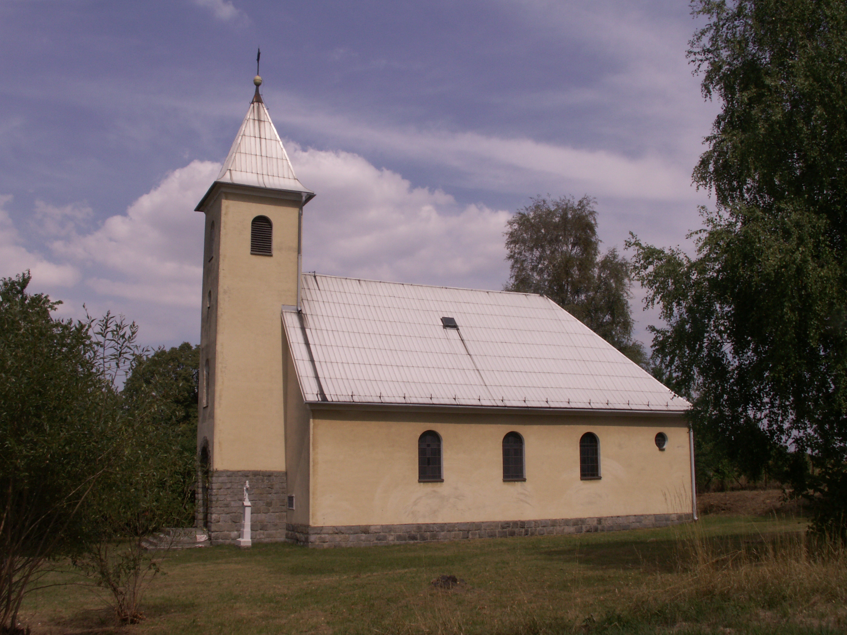 Kolnovice, část obce Mikulovice, okres Jeseník, kostel sv. Rocha